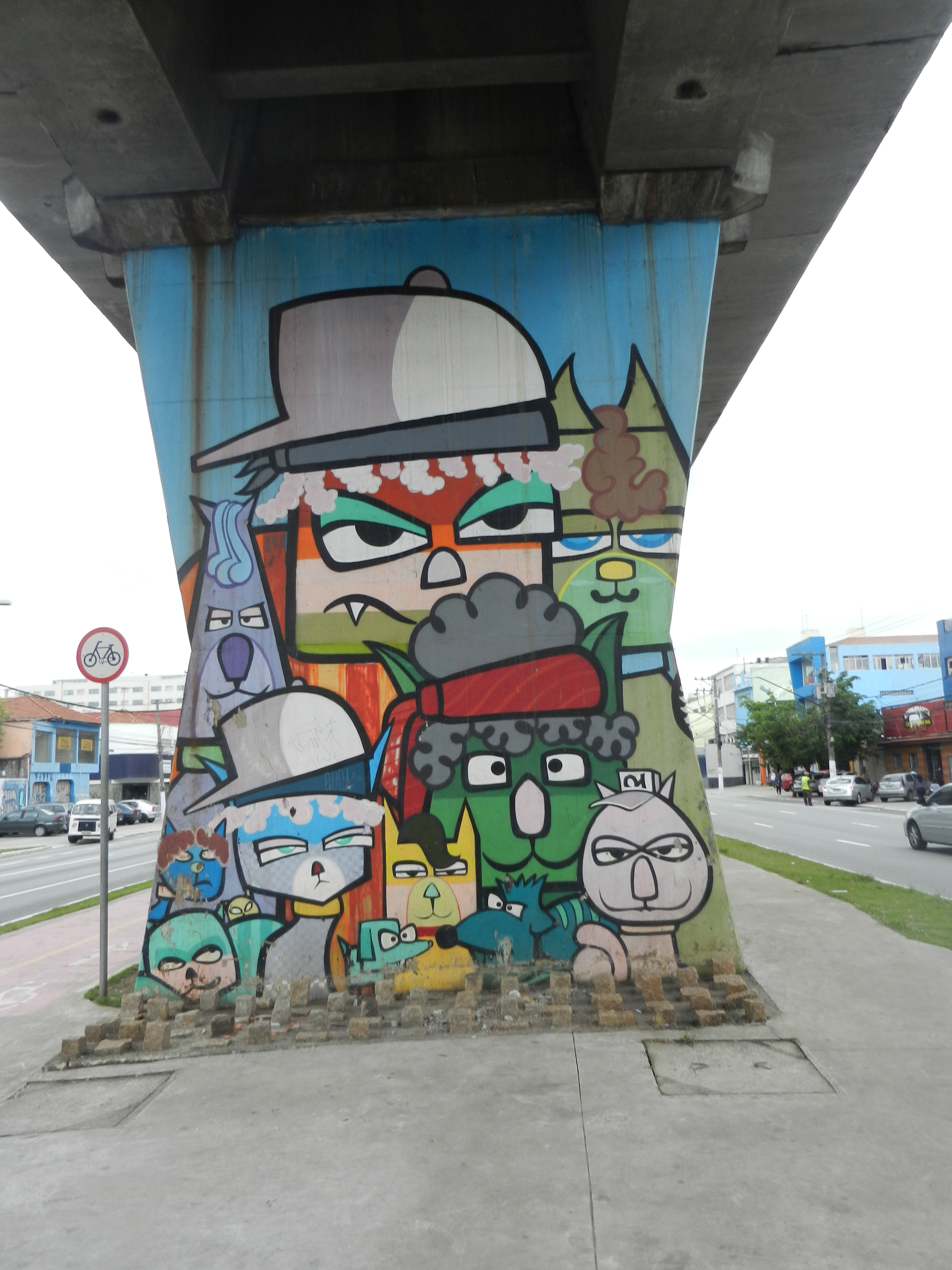 Painel grafitado no Museu Aberto de Arte Urbana de São Paulo.